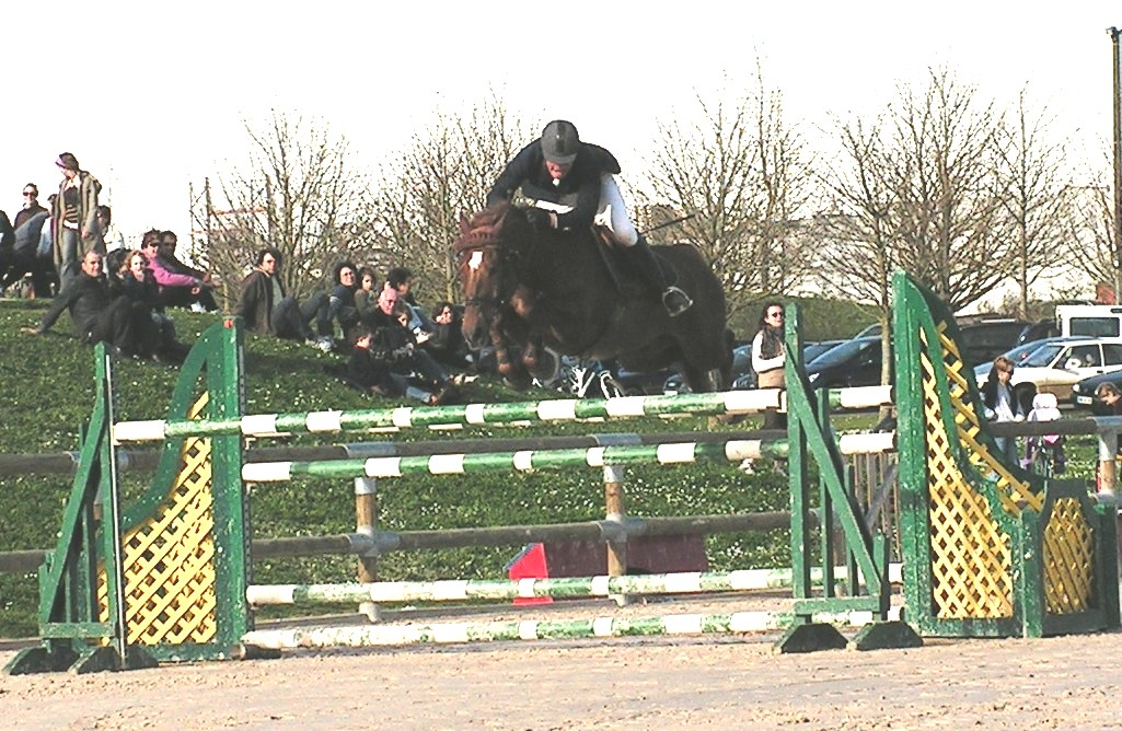 Epreuve grand prix pro2 à Niort en France en Mars 2007